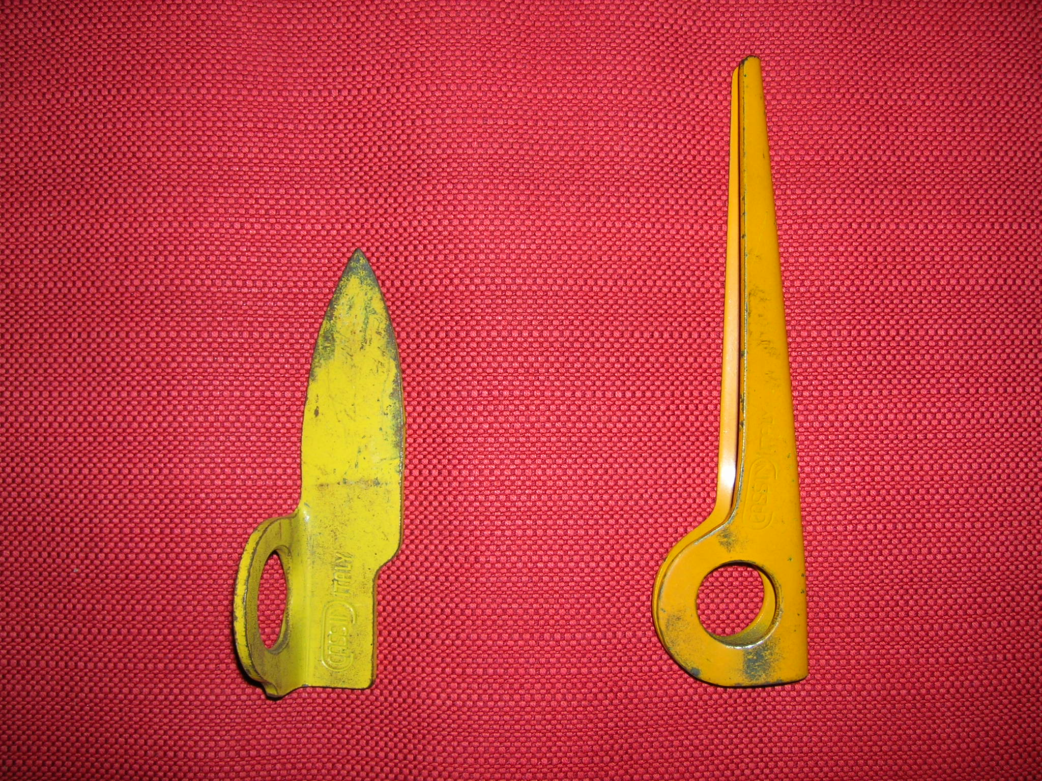 Foto di chiodi da roccia in acciaio speciale. Foto mia.